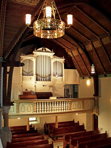 Blick zur Orgel der Hainkirche St. Vinzenz